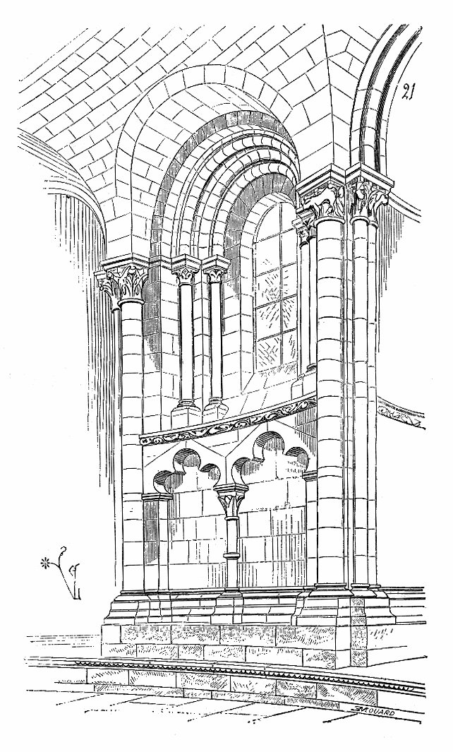 ... On voit que les architectes auvergnats n'avaient pas encore, au milieu du XIIe siècle, admis les arcs-doubleaux séparatifs, et que la voûte de pierre repose directement sur le tailloir du chapiteau. Tout irrégulier qu'il est, l'appareil des arêtes est conforme à la théorie, composé de pierres d'un assez gros volume taillées avec soin. Entre les chapelles absidales, voici (fig. 21) comment sont disposées les pénétrations des baies qui éclairent le collatéral. Les colonnes engagées portent la voûte elle-même, et non les arcs, qui, dans les provinces du Nord, à cette époque, sont déjà chargés de la soutenir. Cependant, dans la première travée du bas côté du chœur de l'église de Notre-Dame du Port, à Clermont, dont la construction est de plus de cinquante ans antérieure à celle de l'église de Saint-Julien de Brioude, on remarque un arc-doubleau séparatif, très-peu saillant, il est vrai, en partie noyé par conséquent dans la voûte même, mais enfin qui indique déjà la tendance à diviser les voûtes annulaires par travées. Cet exemple ne fut pas suivi dans le collatéral circulaire de Brioude, dont les voûtes sont encore franchement romanes comme combinaison, mais construites avec plus de savoir et de soins. Ayant constaté la tendance de cette province centrale à ne pas abandonner ses traditions romanes, même pour la construction des voûtes tournantes posées sur piles isolées qui exigeaient des combinaisons entièrement neuves, nous allons suivre la marche des perfectionnements rapides introduits dans la structure des voûtes appartenant aux édifices du Nord ...